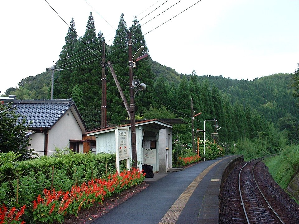 肥薩線中福良駅 2003年8月7日 Bakkai撮影